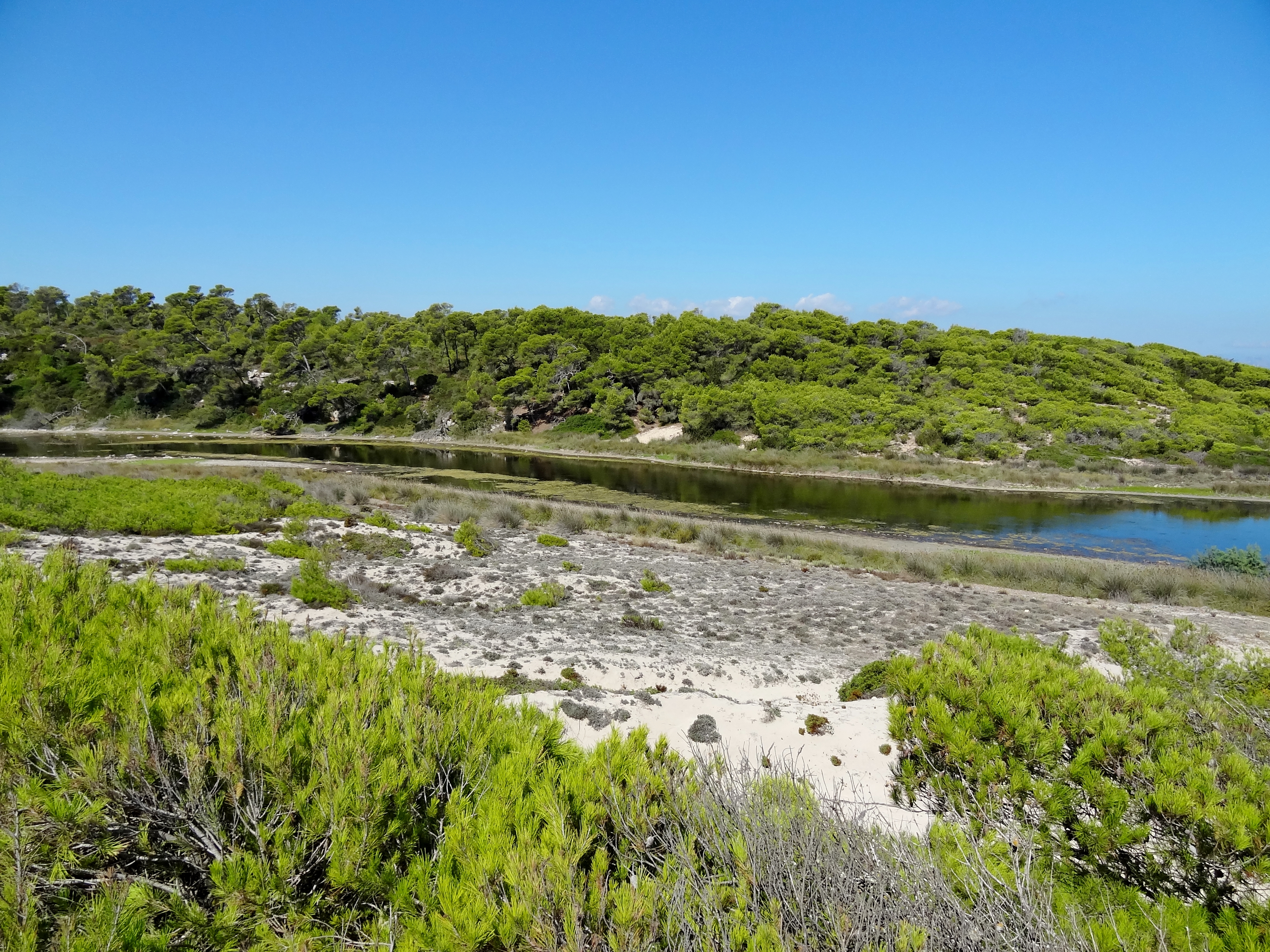 Der Sturzbach Torrent de Son Real in der Gemeinde Santa Margalida, Mallorca, Spanien